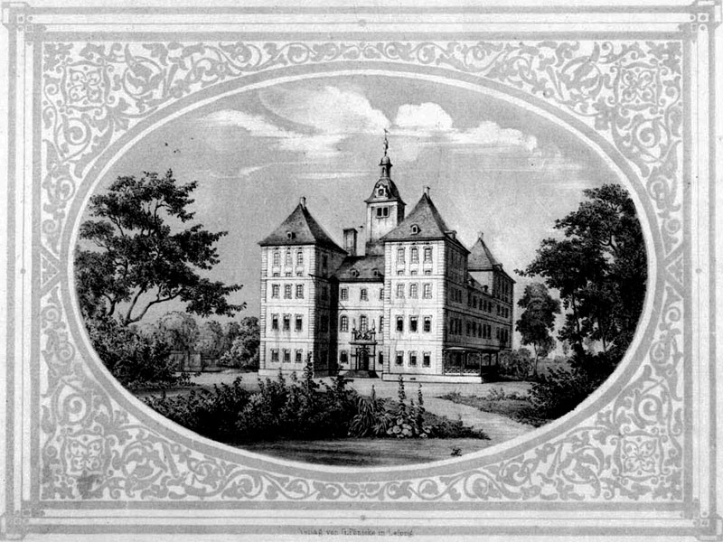 Das Schloss Rötha um 1850